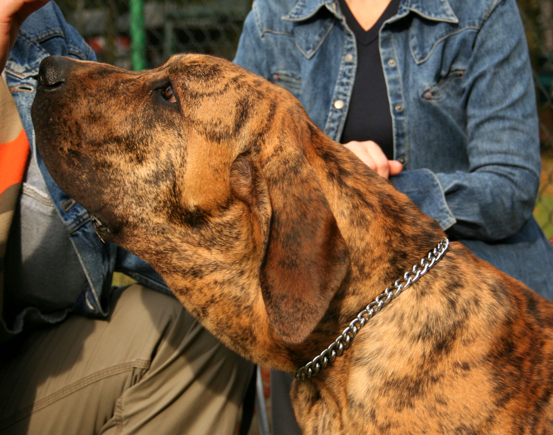 Fila brasileiro (ALMODOVAR Rio Grande - z hodowli RIO GRANDE)